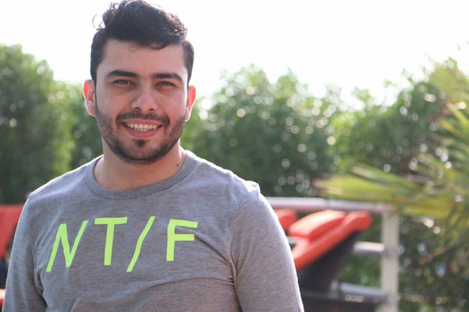 ستار سعد مغني عراقي